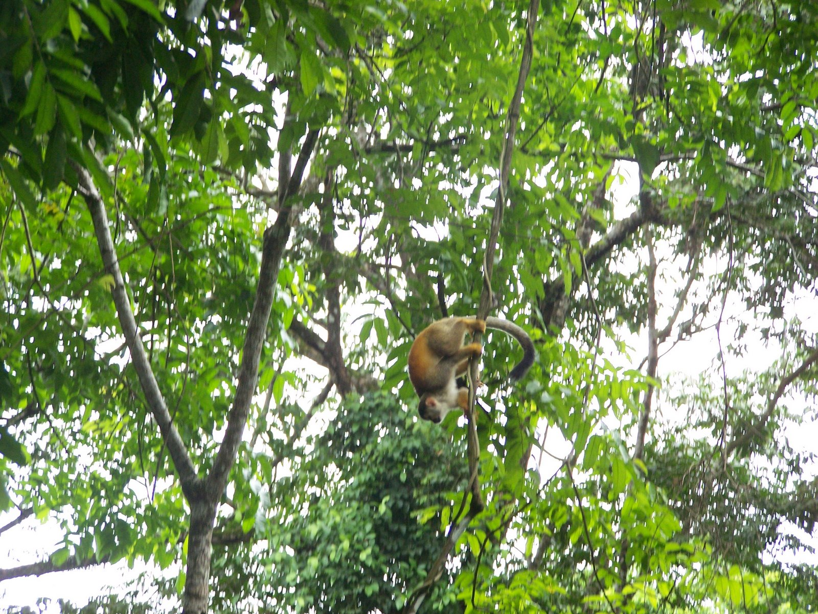 Central American Squirrel Monkey in Manuel Antonio Park, Costa Rica